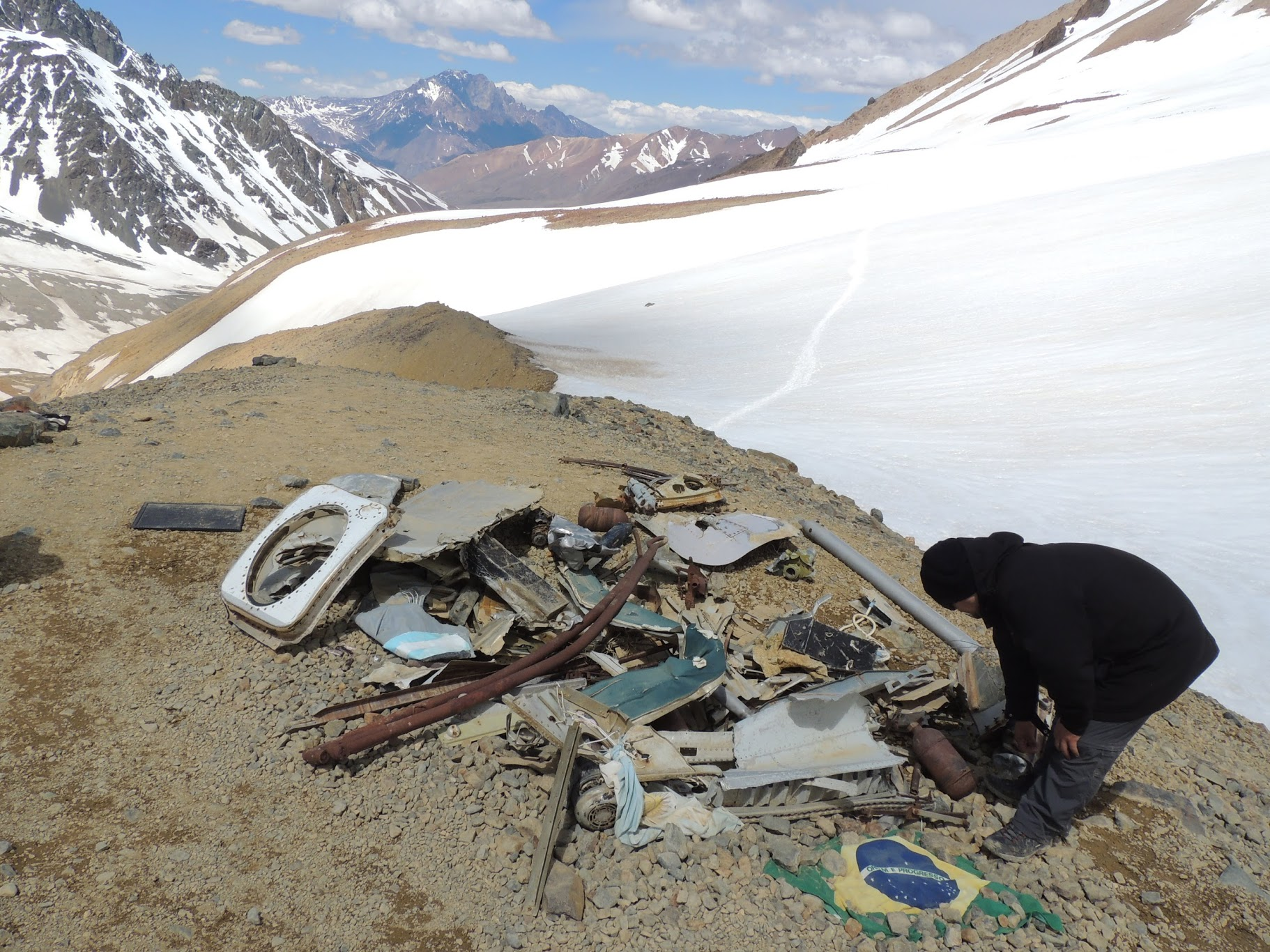 Panorama montañoso hacia el este desde los restos del avión siniestrado. Vuelo 571 de la Fuerza Aérea Uruguaya ocurrido el 13 de octubre de 1972.